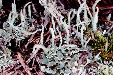 Cladonia coniocraea